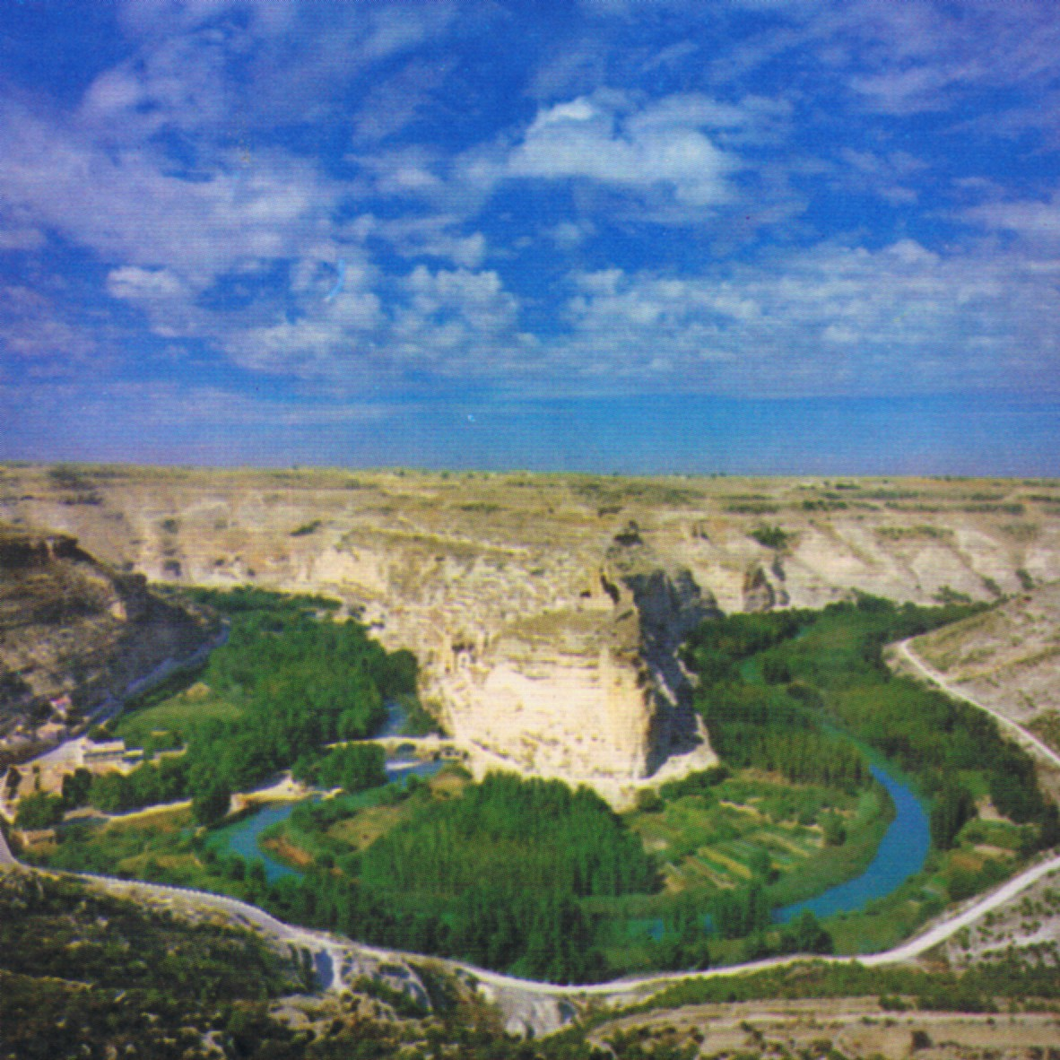 Paisaje de las hoces del Júcar (Alcalá del Júcar-La Mancha-España)